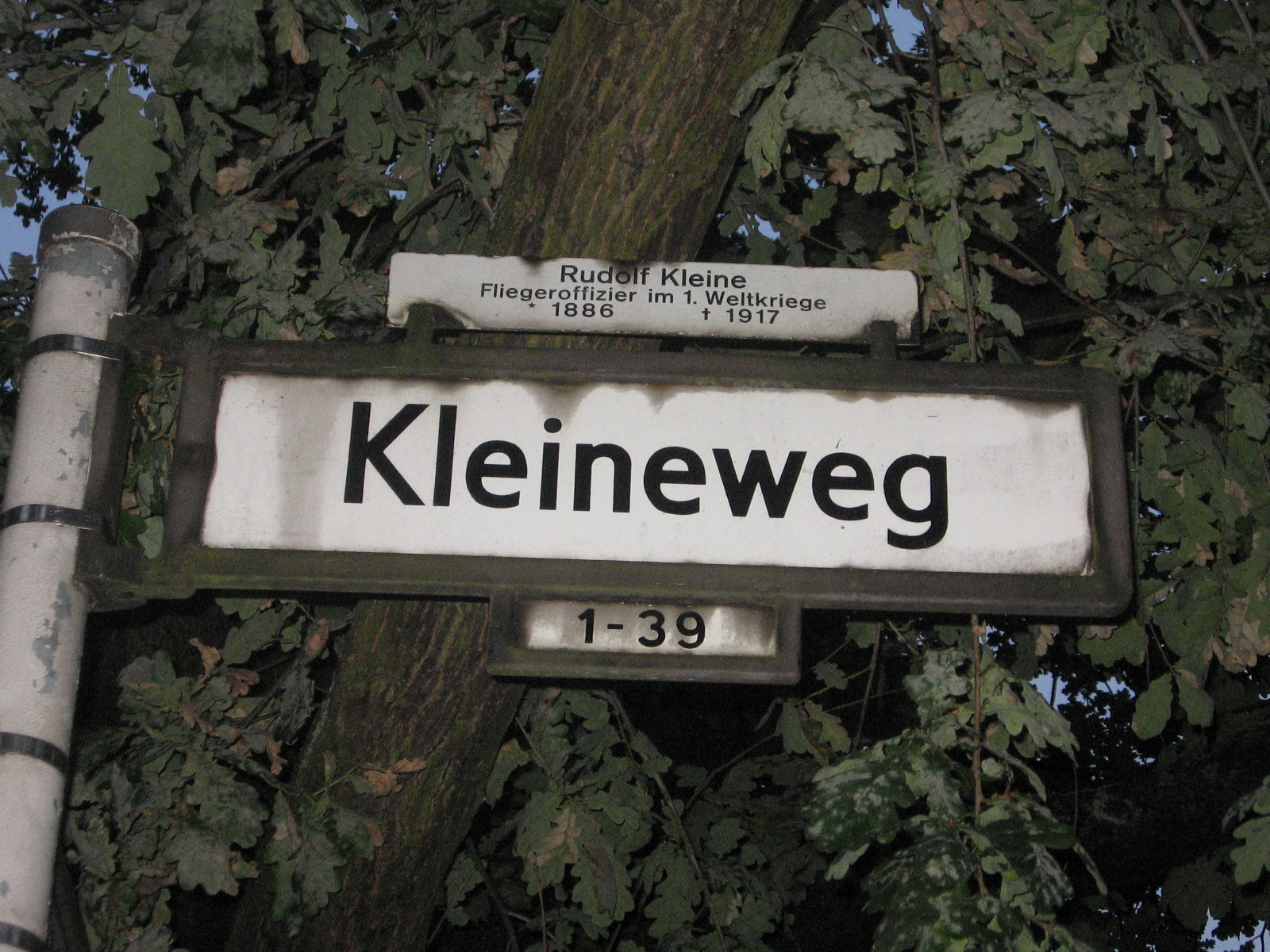 Straßenschild des Kleineweg in Berlin-Tempelhof. Benannt nach Rudolf Kleine (* 28. August 1886 in Minden; † 12. Dezember 1917 über Ypern) war ein preußischer Offizier, zuletzt Hauptmann und Kommandeur des Kampfgeschwaders 3 im Ersten Weltkrieg.